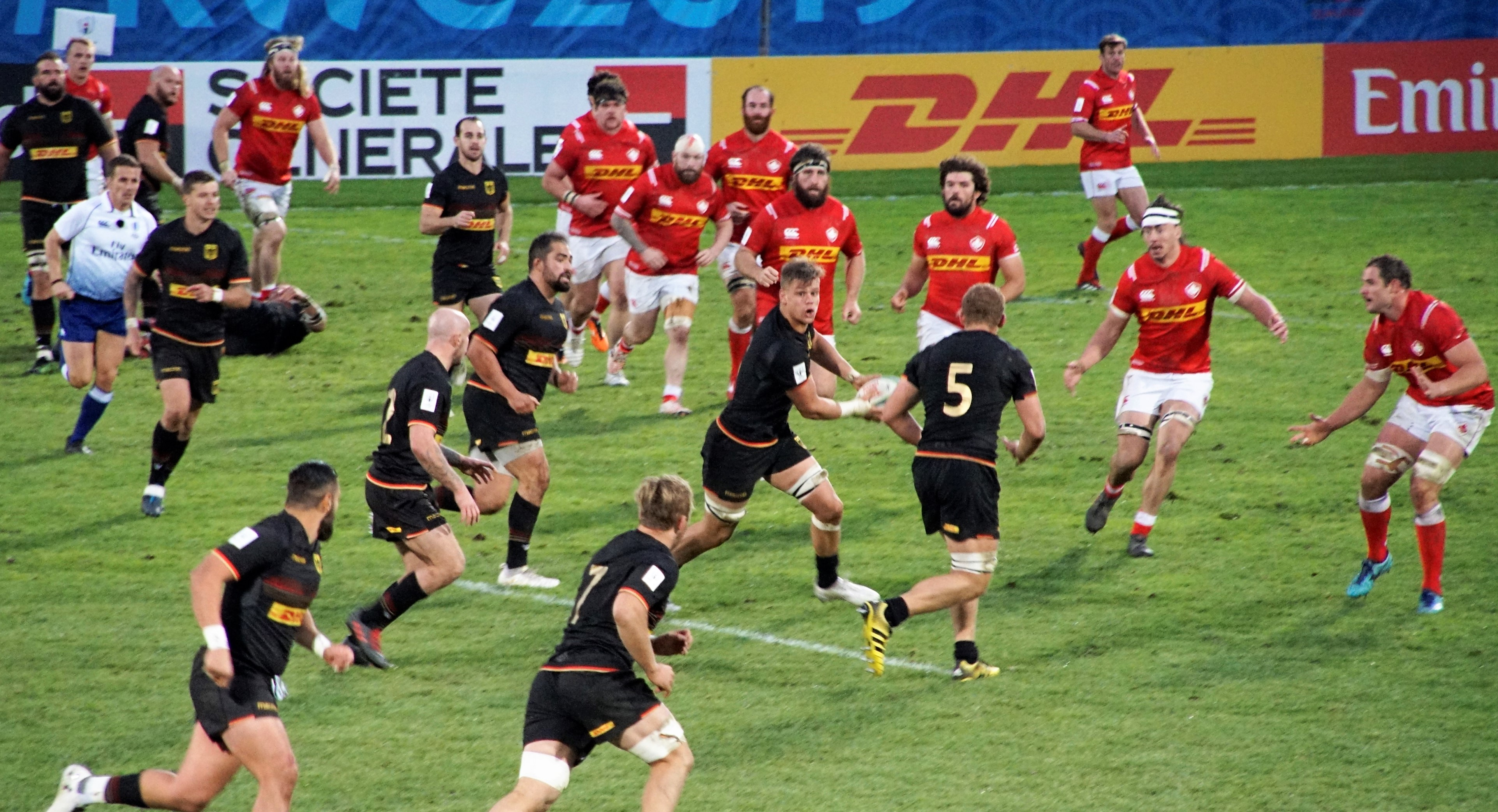 Der deutsche Sturm mit Passangriff gegen Kanada